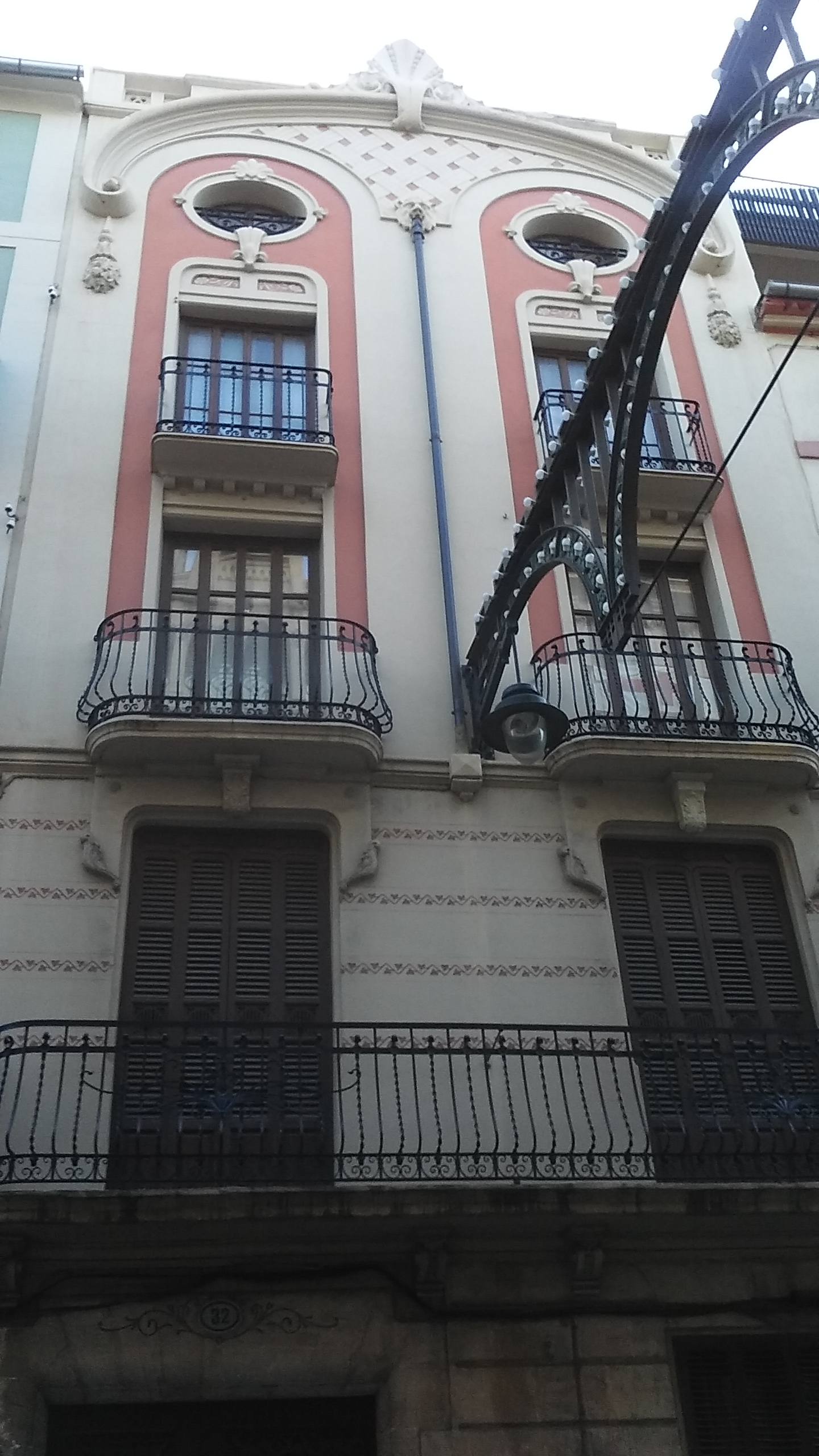 Edifici moderniste en el carrer Sant Nicolau número 32 d'Alcoy (Alacant). Obra de l'arquitecte Timoteo Briet Montaud, 1901.